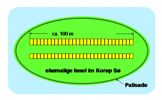 Barkjaer